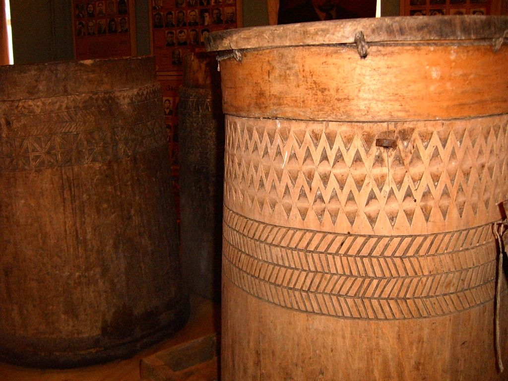 Эрзянь: Эрзянь парь, кона пурназь Иваньбиёнь эрзянь культурань музейсэ